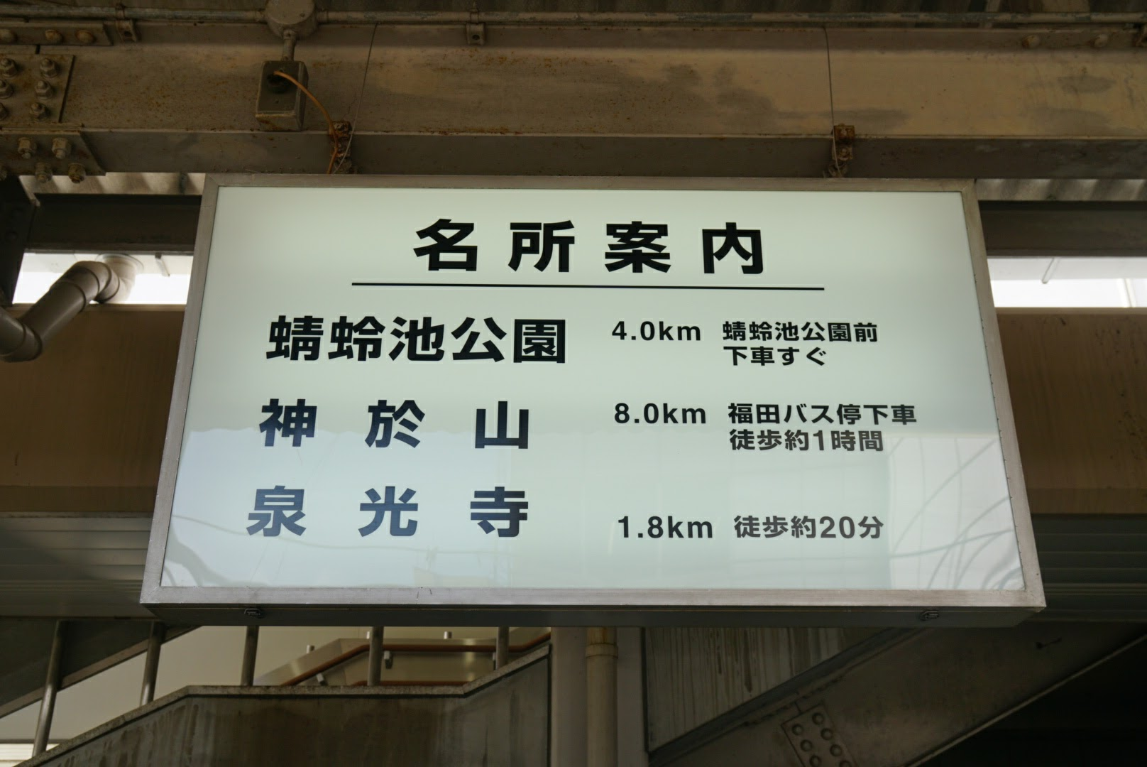 Shimomatsu station Tourist information